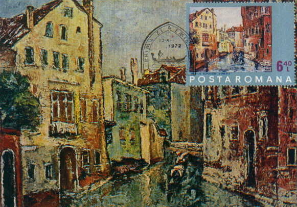 Venice by Marius Bunescu